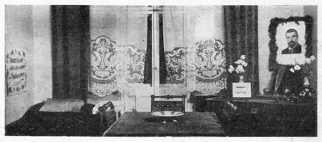 Комната, где жил И. С. Проханов в последнее время. Фото сделано после его смерти